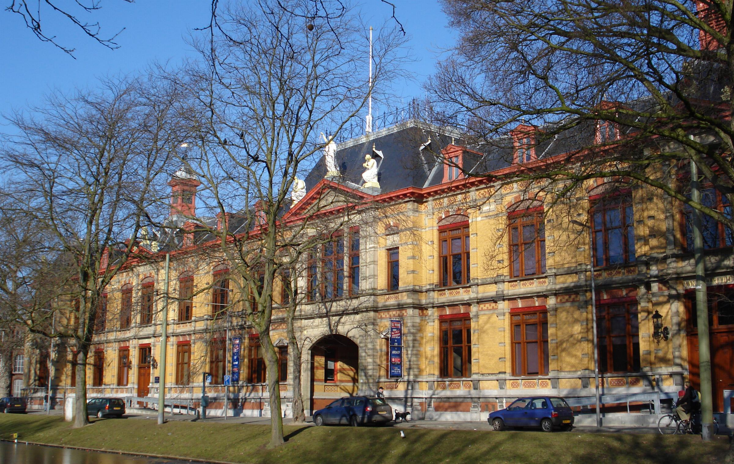 Rotterdam, Noordsingel, Rijksmonument.